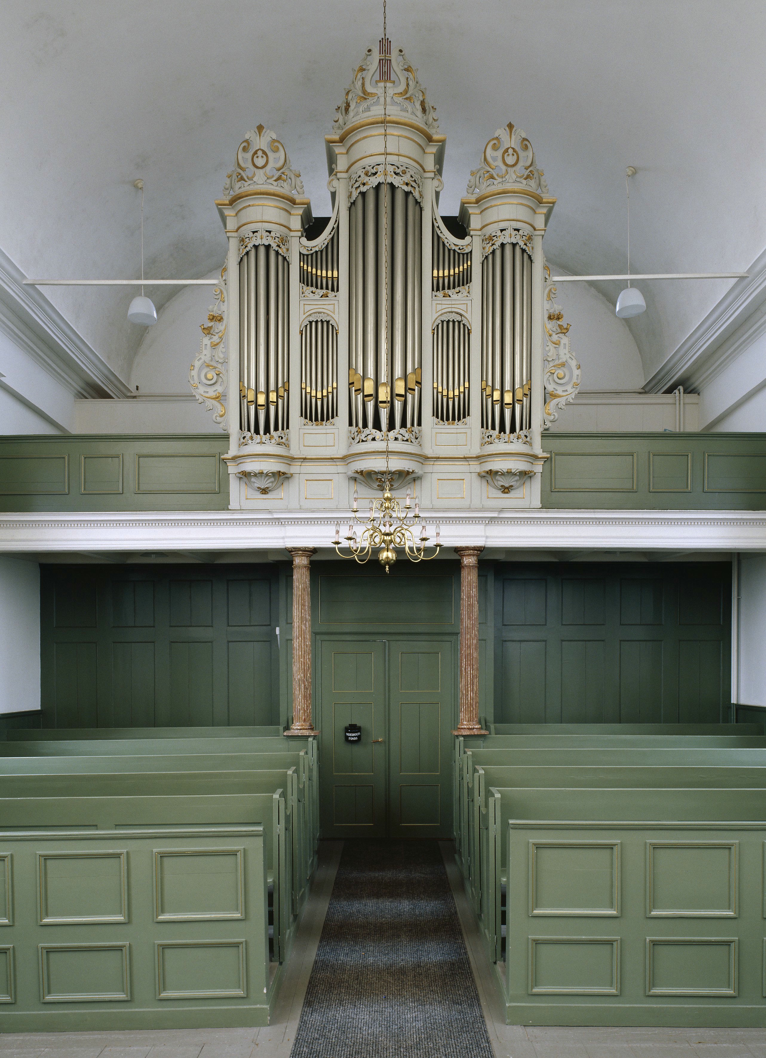 Doopsgezinde Kerk: Interieur, aanzicht orgel (opmerking: Gefotografeerd voor Het Historische Orgel in Nederland 1878-1886, Bladzijde 173)